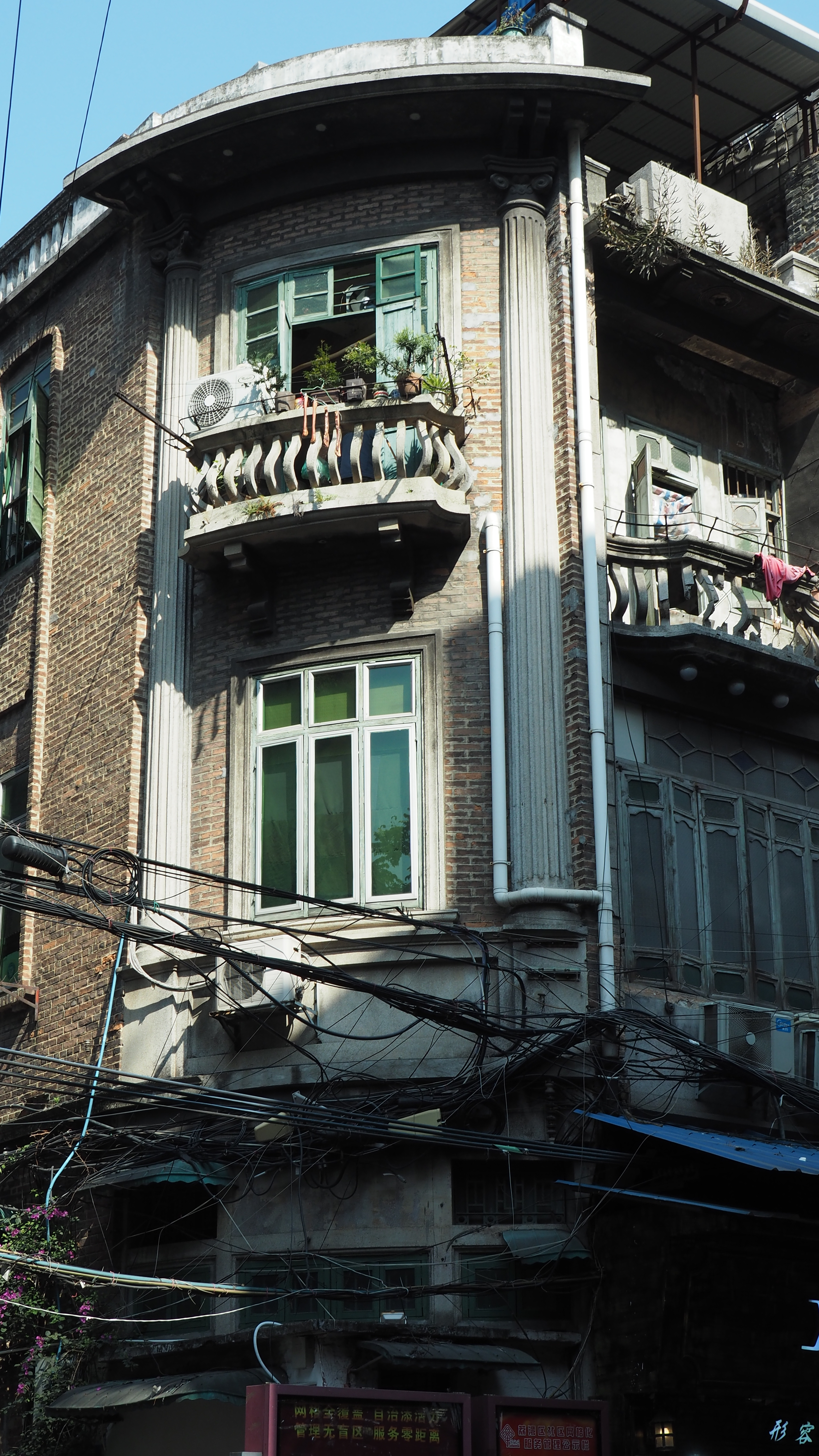 中文（中国大陆）: 位于广东省广州市荔湾区桨栏路58号。